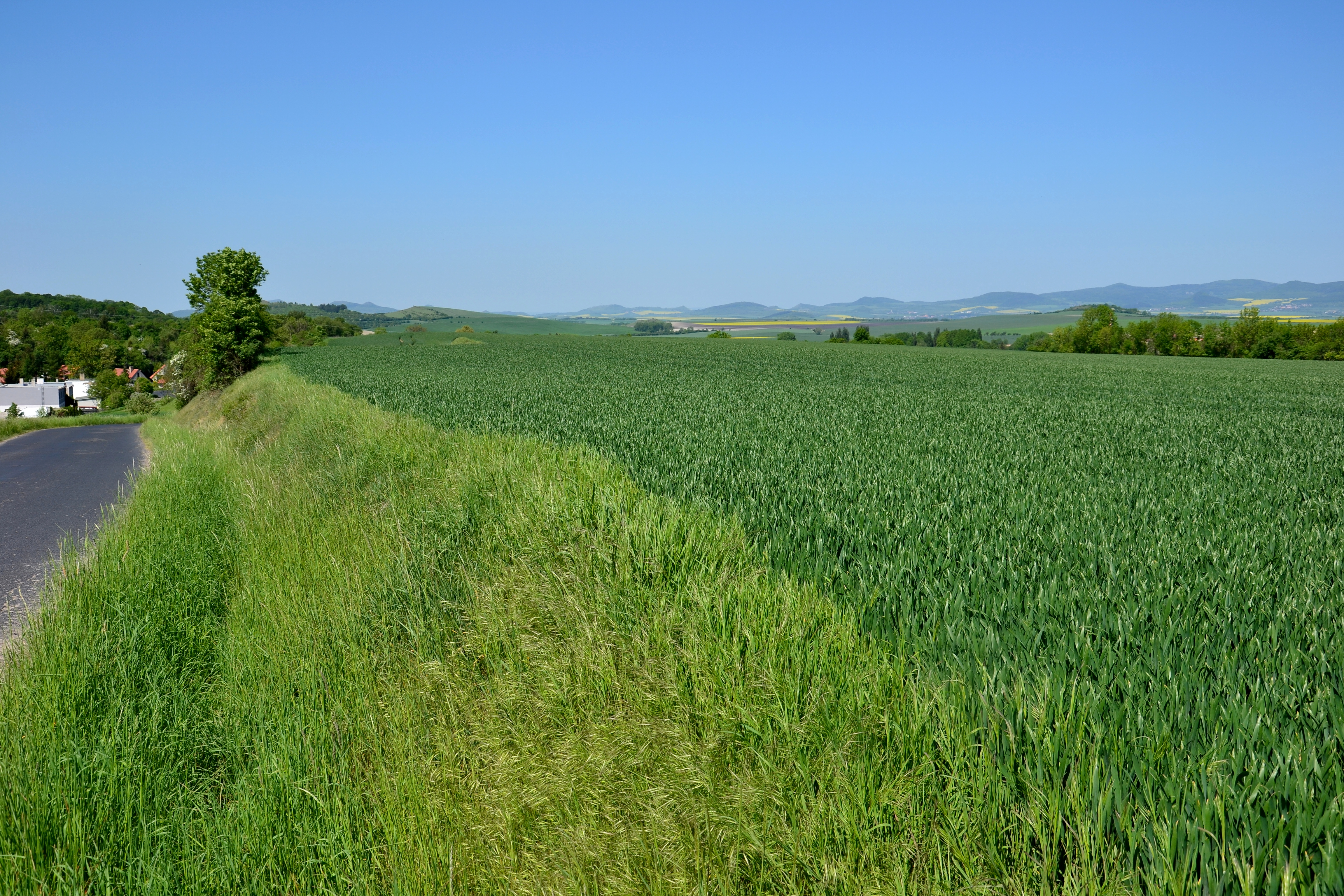 Poplze – východní část hradiště